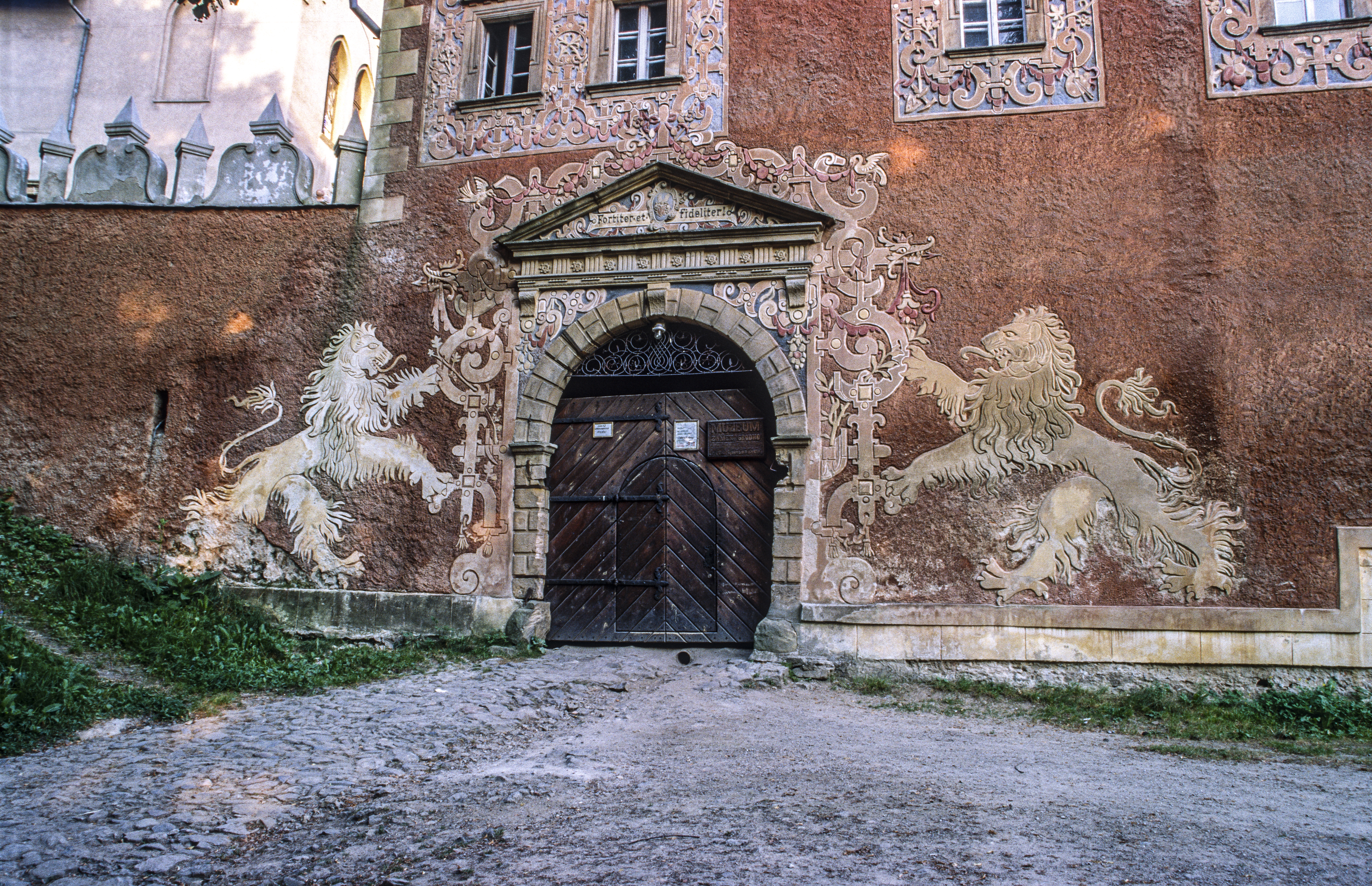 Zagórze Śląskie, zamek Grodno, budynek bramny.